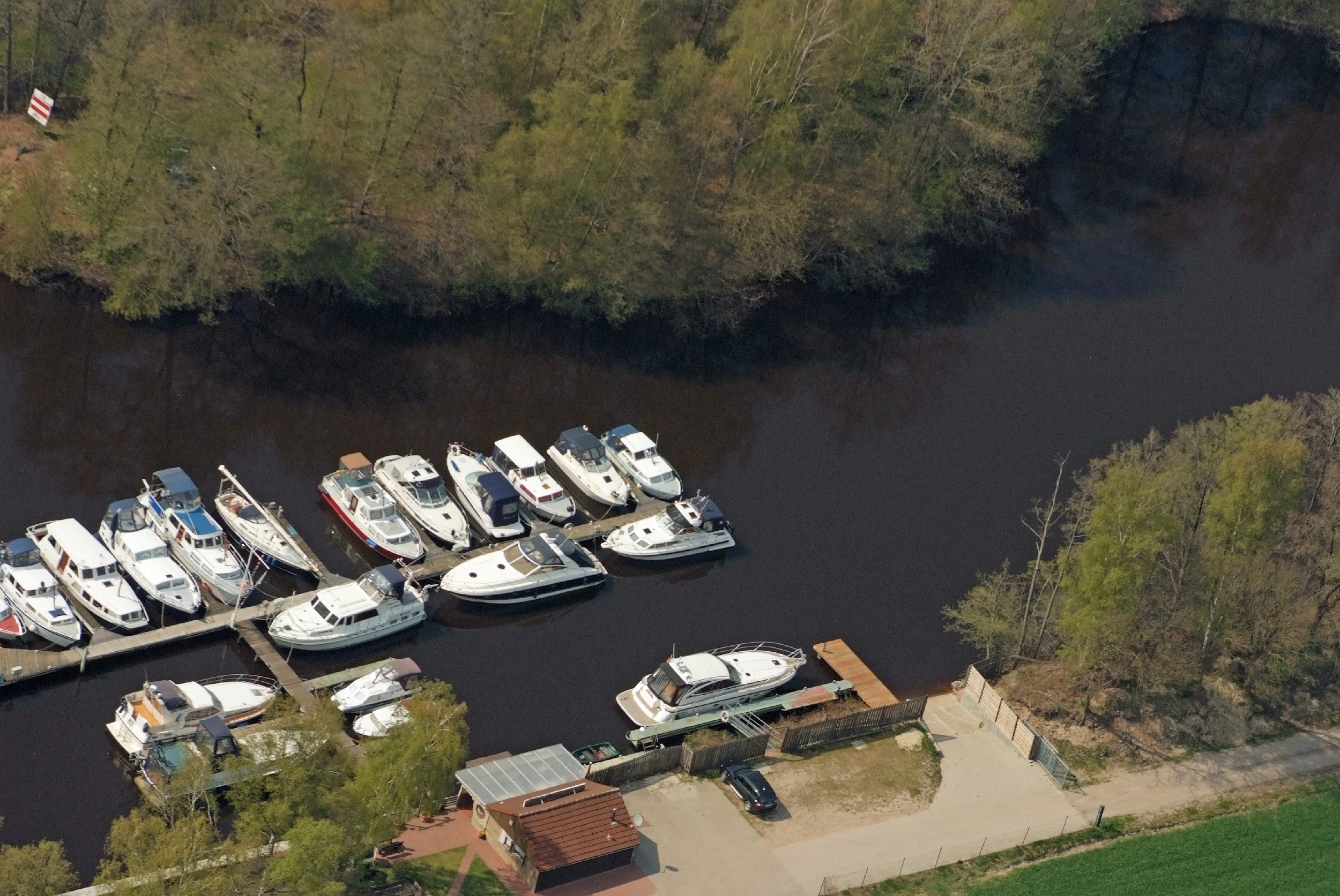 Yachtfafen im Seitenarm Goldfischdever, Küstenkanal, bei Dörpen / Fotoflug von Nordholz-Spieka nach Oldenburg und Papenburg